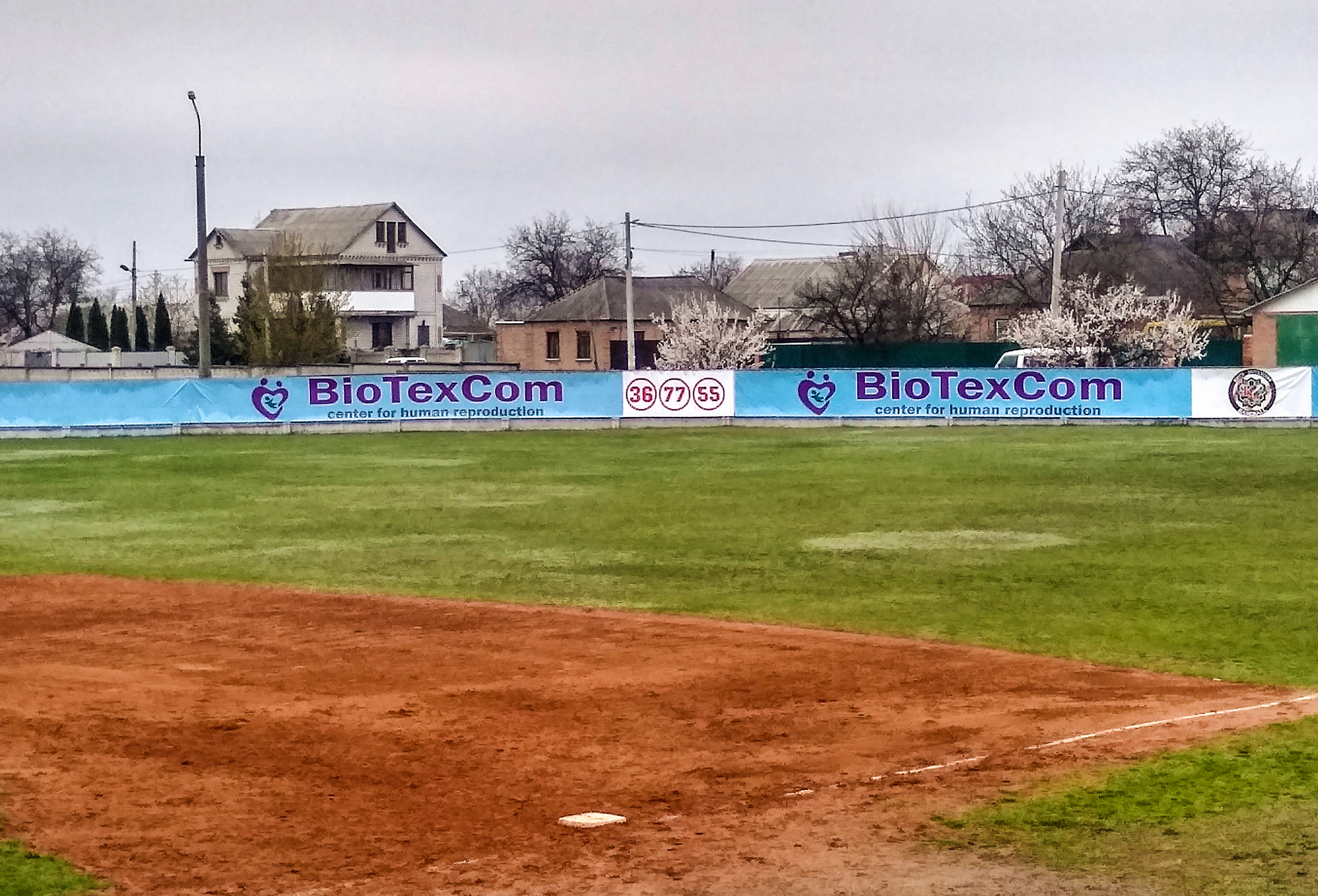 бейсбольний стадіон в Кропивницькому